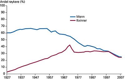 Andel røykere i Norge, kvinner/menn 1927 til 2007